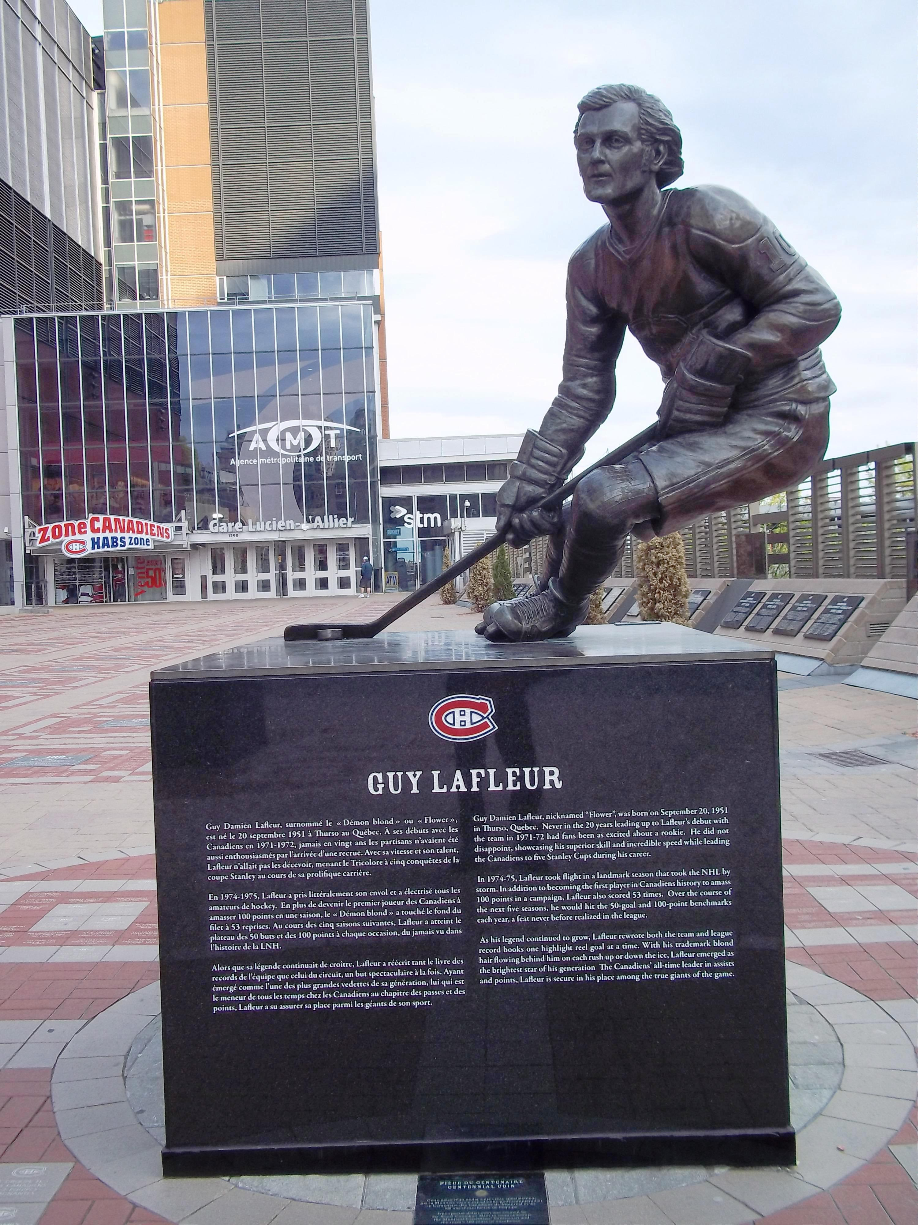 Statue de Guy Lafleur, Centre Bell, Montréal